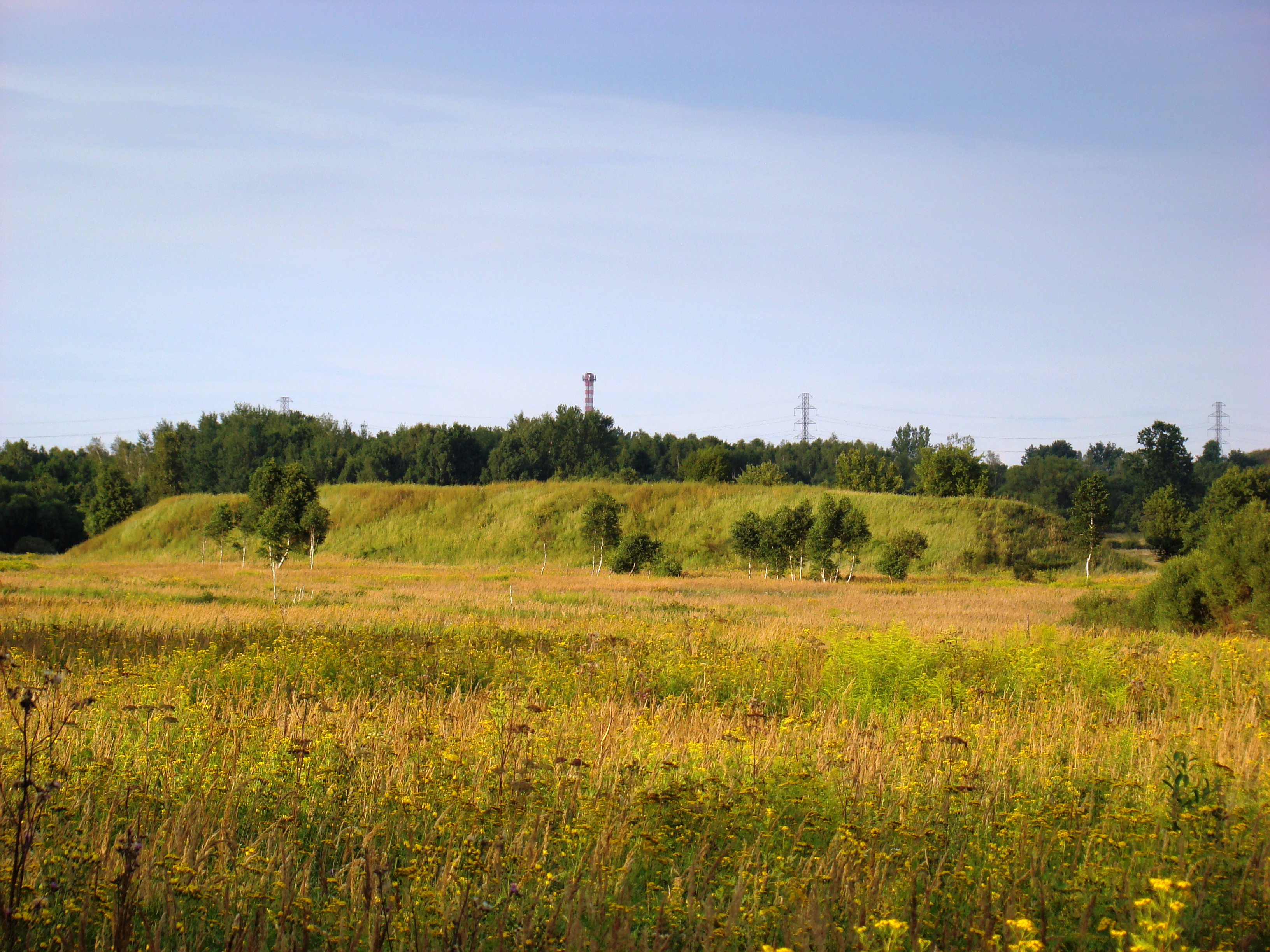 Pozostałości hałdy kopalni rud żelaza "Franciszek stary" w okolicach Liszki Dolnej